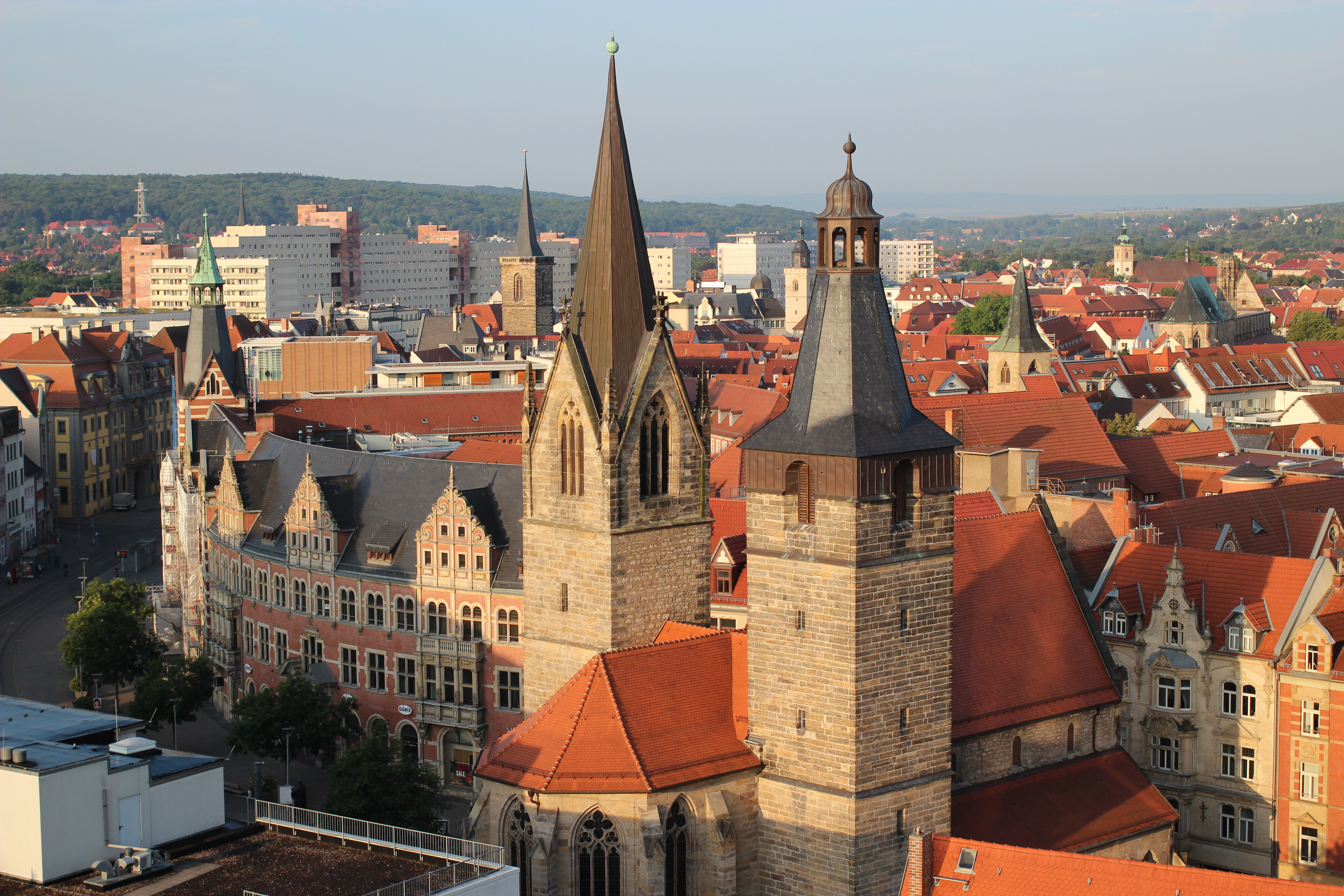 Erfurt as seen from the 12th floor of Radisson Hotel